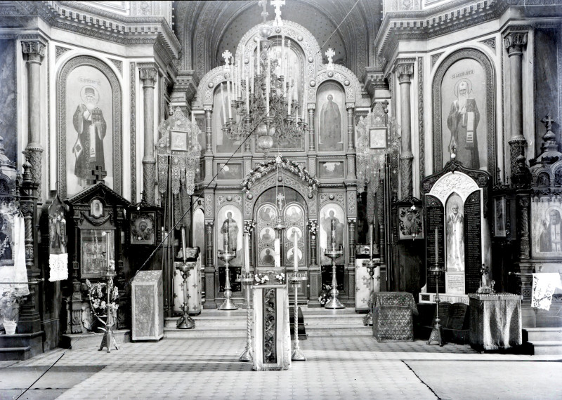 Wnętrze Soboru św. Aleksandra Newskiego w Łodzi